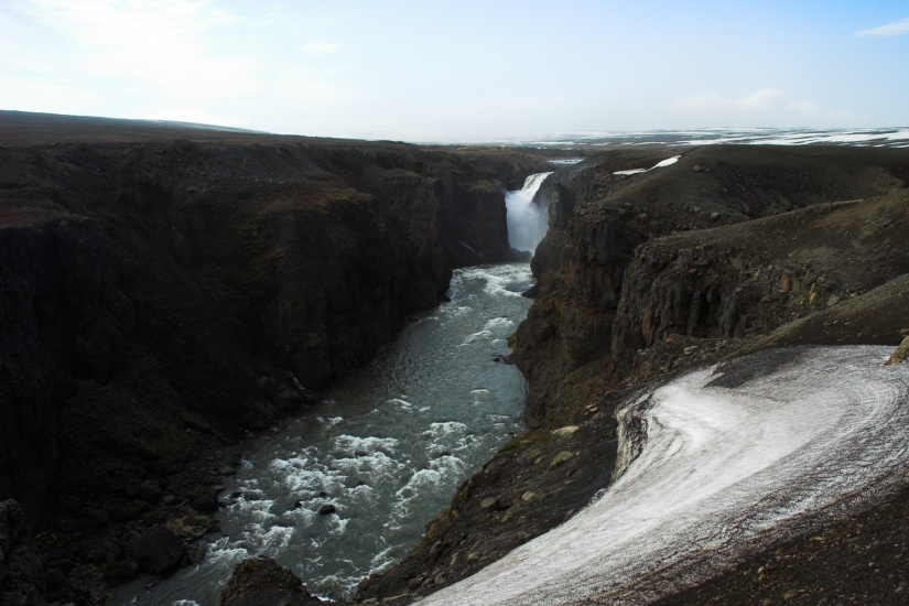 Sauðárfoss í Sauðá 1. júní 2006 - þessi mynd er tekin af mér (is:notandi:oliagust)